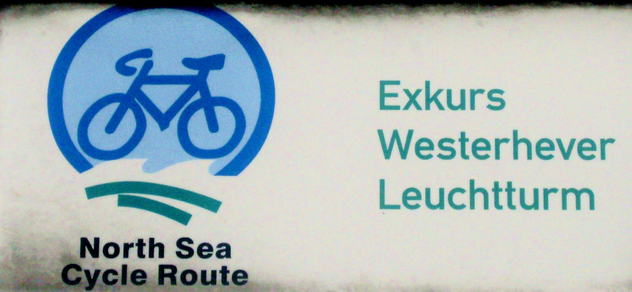 Ausschilderung des Exkurs Westerhever Leuchtturm vom Nodseeküstenradweg/ NorthSeaCycleRoute bei Sankt Peter-Ording